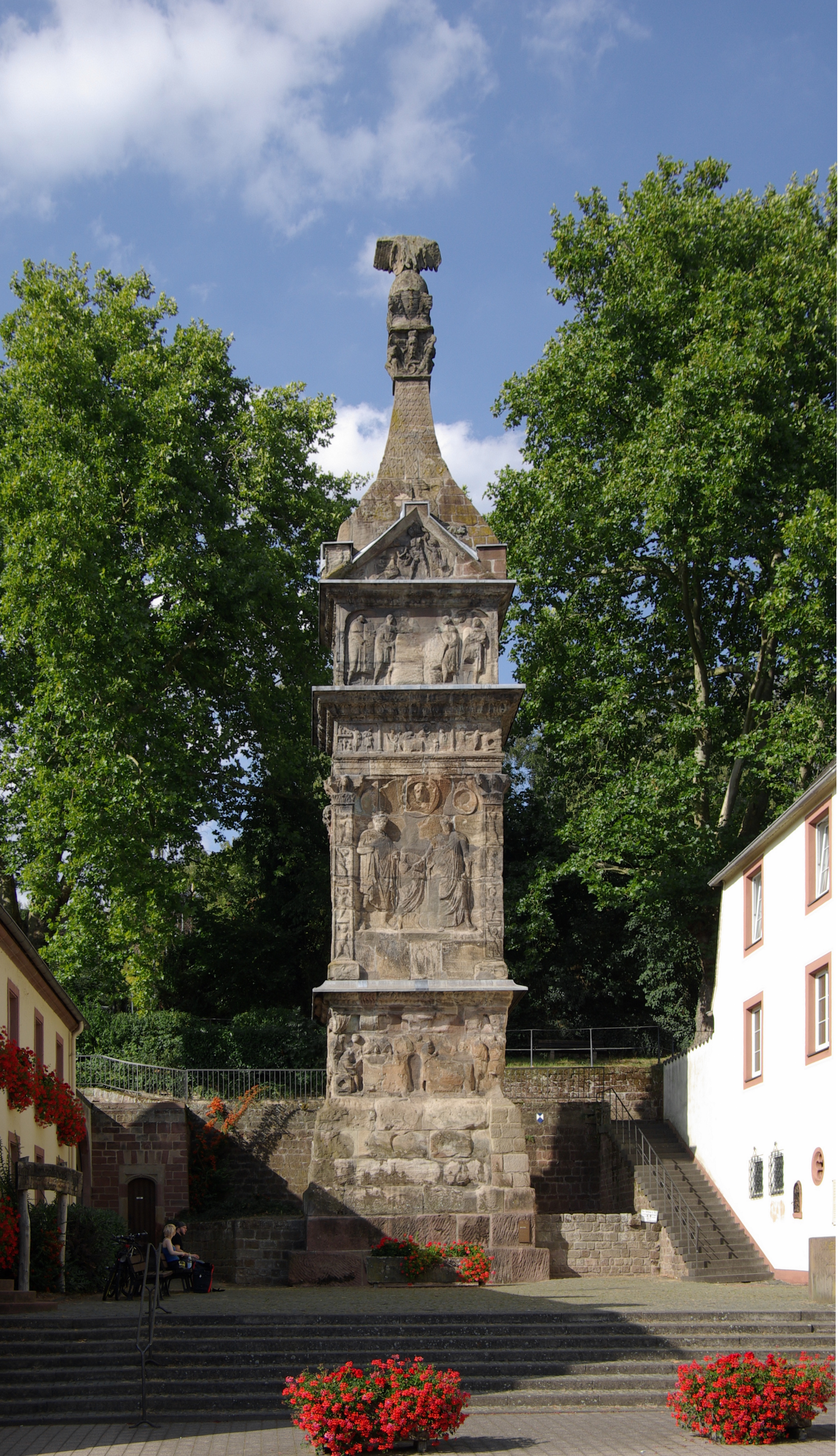 Igel (Mosel), Igeler Säule (Trierer Straße): römisches Pfeilergrabmal der Sekundinier, um 250.